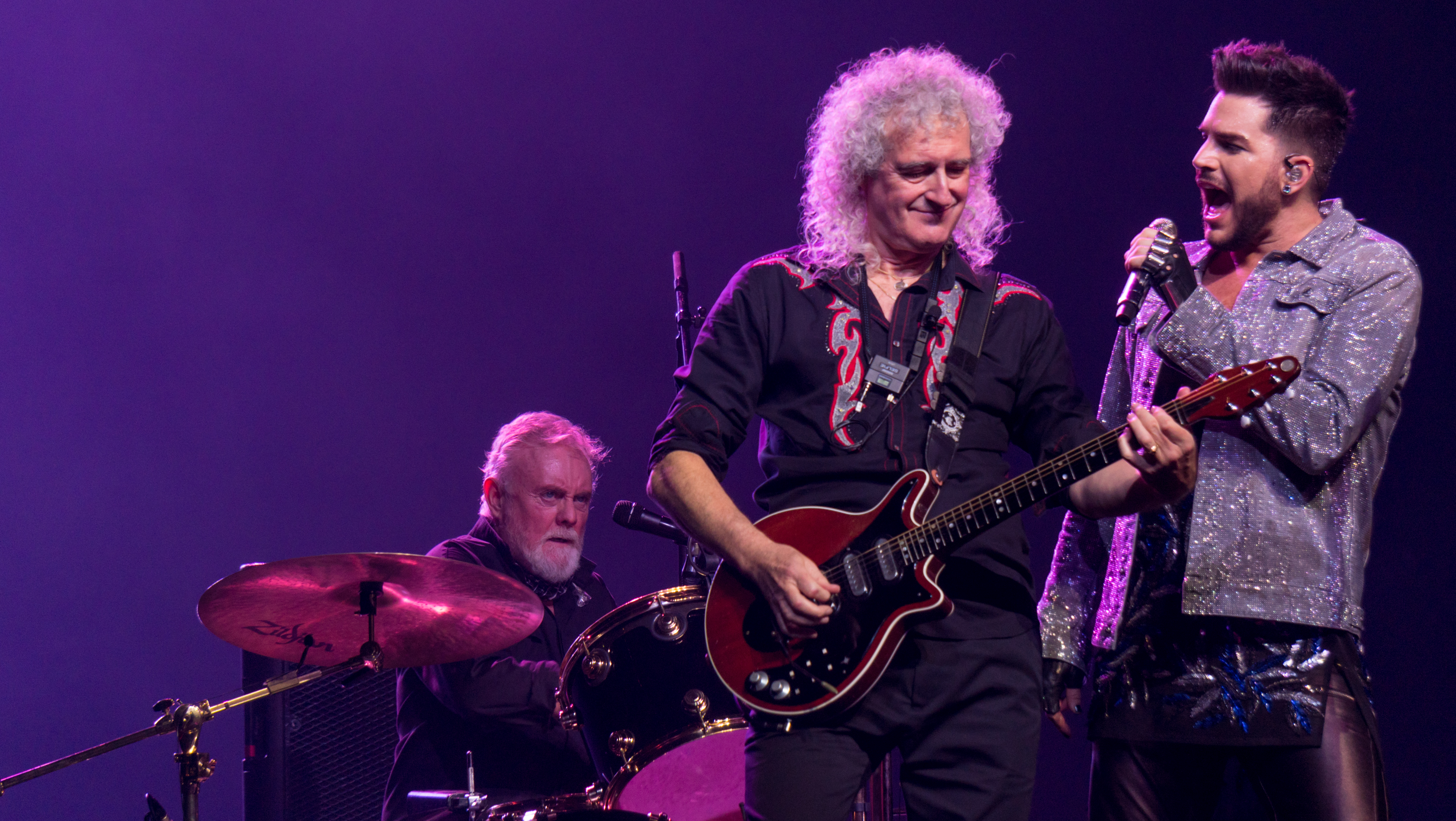 QueenO2121217-45